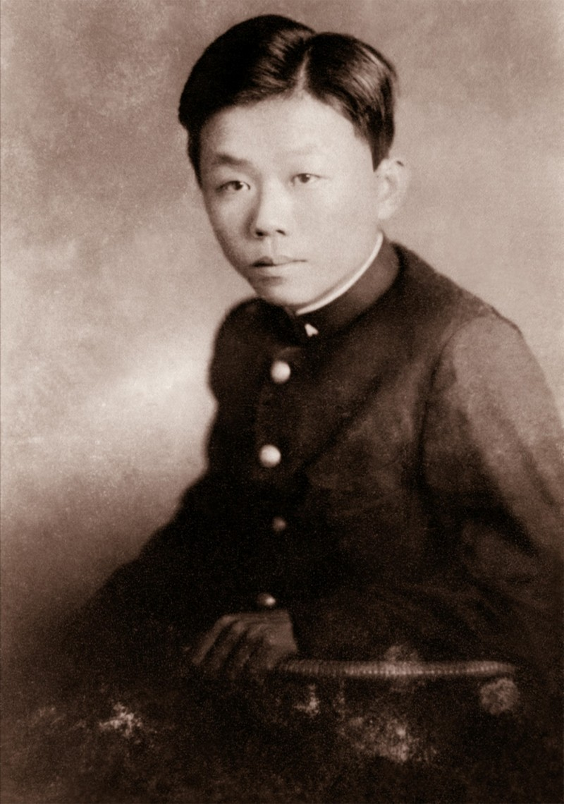 中文（台灣）: 詩人李張瑞